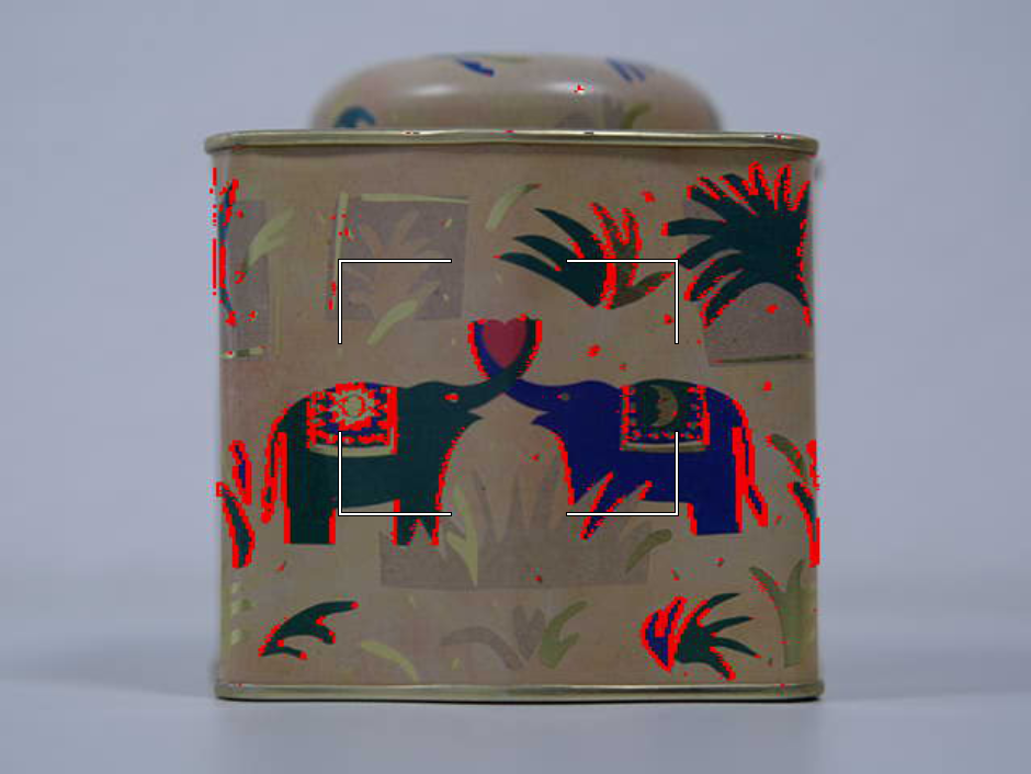 Photographische Live-View-Aufnahme einer Blechdose mit aufgemalten Elephanten mit erweiterter Realität: die rot hervorgehobenen Kanten zeigen die scharf eingestellten Bildbereiche an.